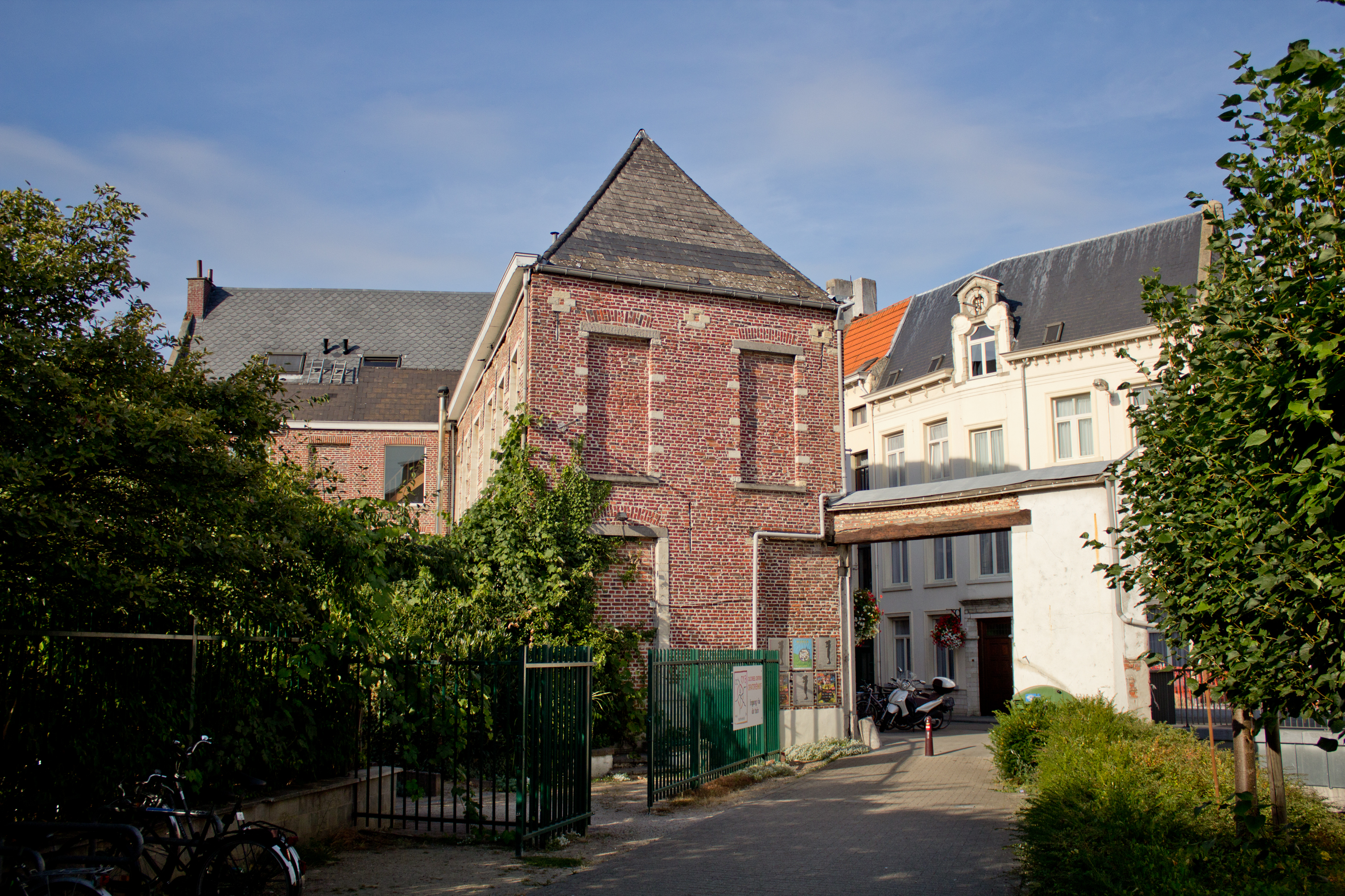 Oratoriënhof, Leuven.